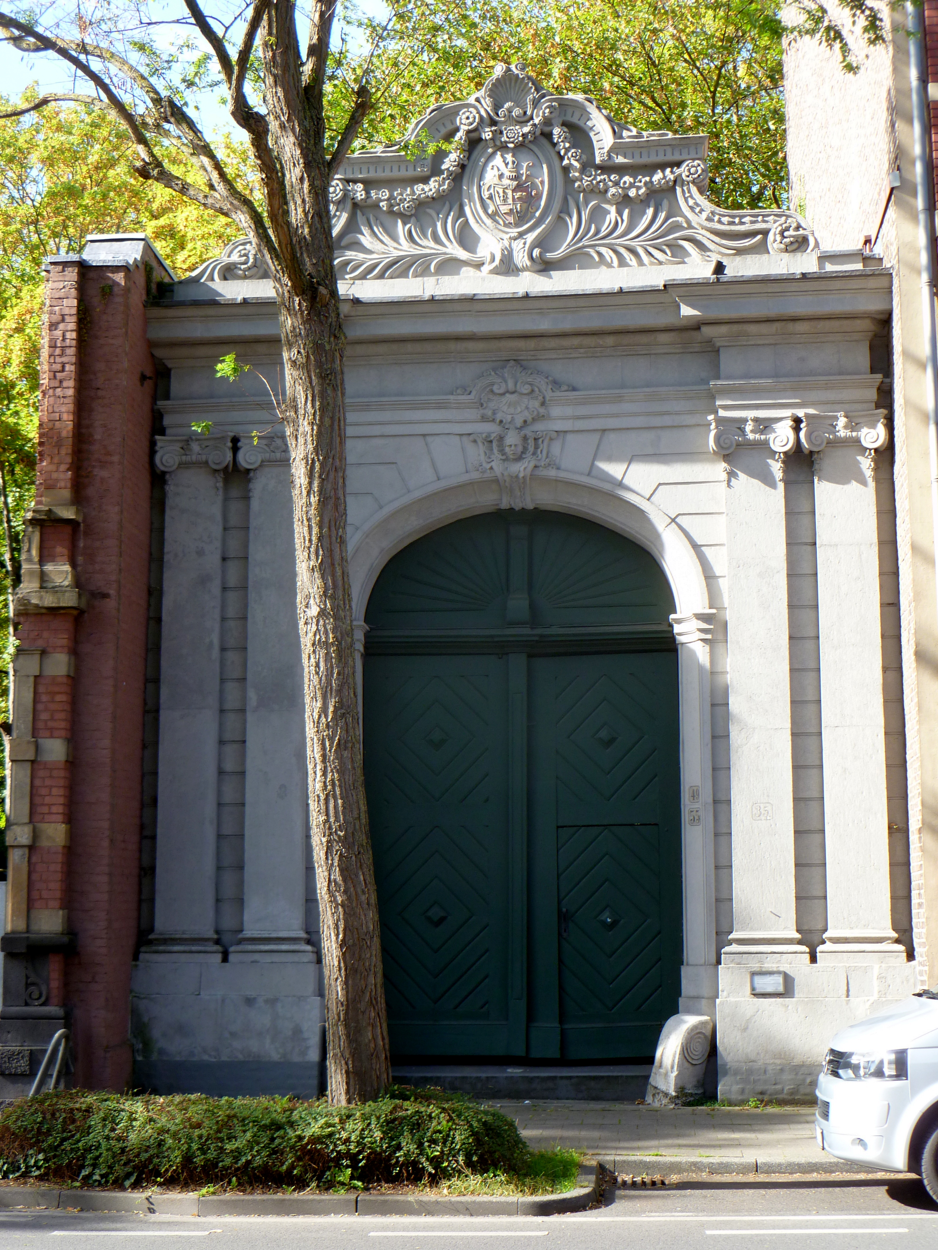 Portal der ehem. Lochnervilla in Aachen, Karlsgraben 55, Baudenkmal